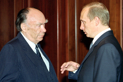 МОСКВА, КРЕМЛЬ. С Председателем Комиссии при Президенте по реабилитации жертв политических репрессий Александром Яковлевым.